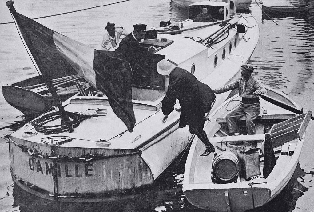 Coupe de la Méditerranée, Course Alger-Toulon en canot automobile. Camille du Gast montant à bord de son canot automobile pour le départ de la deuxième étape, le 13 mai 1905 à Port Mahon. Détail de la couverture de La Vie au Grand Air du 19 mai 1905 (voir l'original qui montre également le contre-torpilleur Le Dard qui escorta Le Camille durant la course et participa au sauvetage de Madame du Gast et de ses cinq équipiers). Légende originale: Madame du Gast à Mahon. Mme du Gast regagne pour la dernière fois le bord de son canot Le Camille, que quelques heures plus tard, forcée par la tempête, elle devait abandonner. .